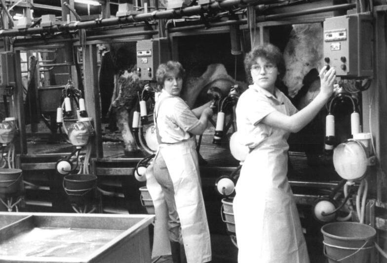 Großerkmannsdorf, Bäuerinnen im Melkstand ADN-ZB Häßler 22.3.86 Bez. Dresden: Rechnersysteme für Milchviehanlagen - Mit der Erprobung eines automatisierten Systems zur Produktionskontrolle und -steuerung von Milchviehanlagen wurde am 21.3.86 in der LPG Tierproduktion Großerkmannsdorf begonnen. Rechnersysteme ermöglichen Futterbedarf- und -einsatz zu berechnen, Milchleistung zu erfassen - hier am Melkkarussell - und darauf aufbauend die Milchproduktion zu steuern.